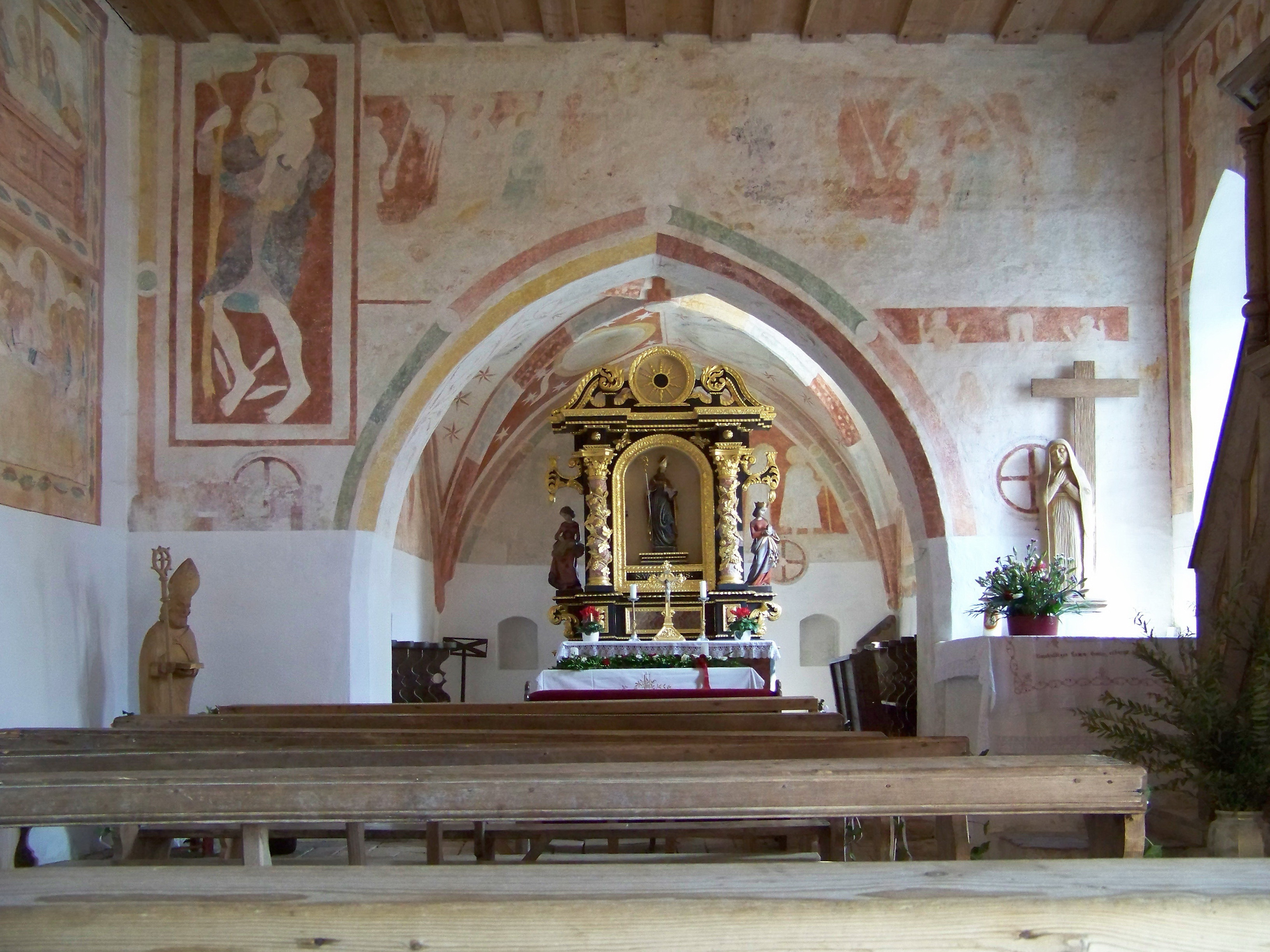 Essenbach, St. Wolfgang 2. Kirche St. Wolfgang. Saalkirche mit eingezogenem quadratischem Chor und Westturm, frühgotische Anlage um 1300, Backsteinbau, Turmuntergeschoss wohl spätes 15. Jahrhundert, Turmaufbau 1689, Gliederung am Turm durch Geschossteilung und Blendbögen, mit Kupppelhaube; mit Ausstattung; Kirchhofmauer, wohl 17./18. Jahrhundert. Innenraum.